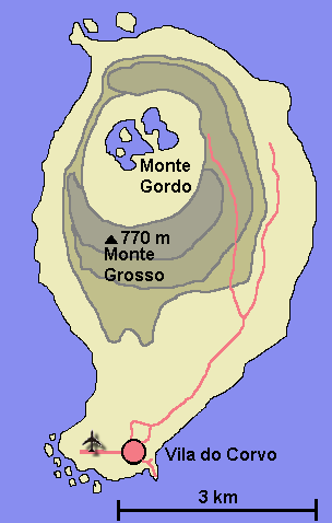 Karta över ön Corvo i Azorerna.